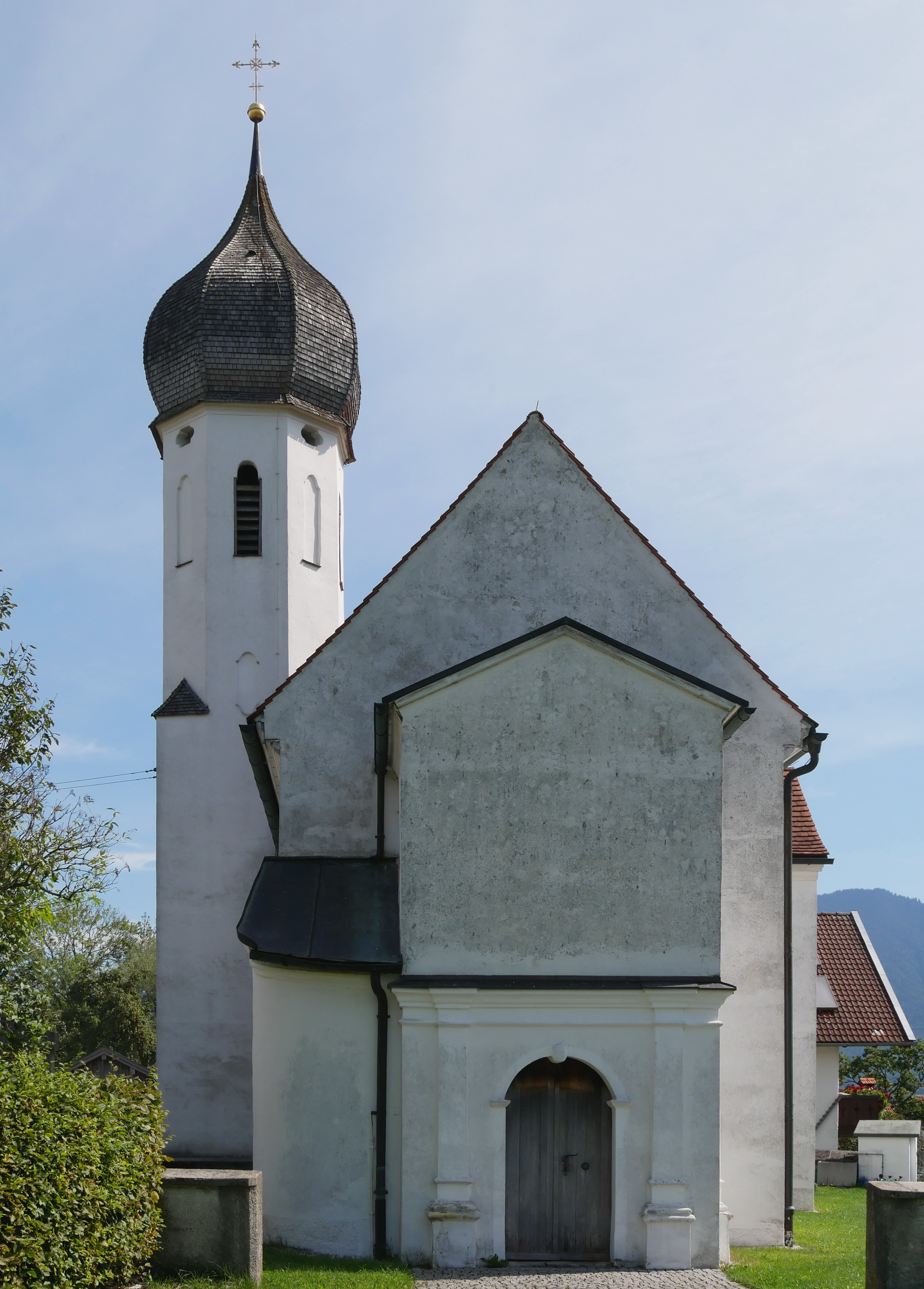 Schlehdorf, Ortsteil Unterau, Unterau 49: Katholische Filialkirche Sankt Andreas. Ansicht von Westen